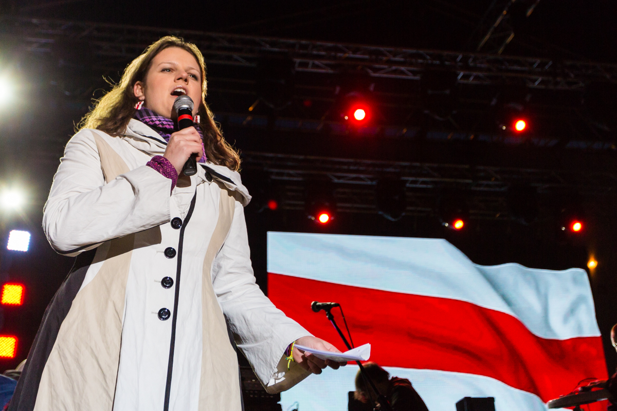 Koncert "Solidarni z Białorusią" 12 kwietnia 2014 roku na ul. gen. Tokarzewskiego-Karaszewicza w Warszawie.